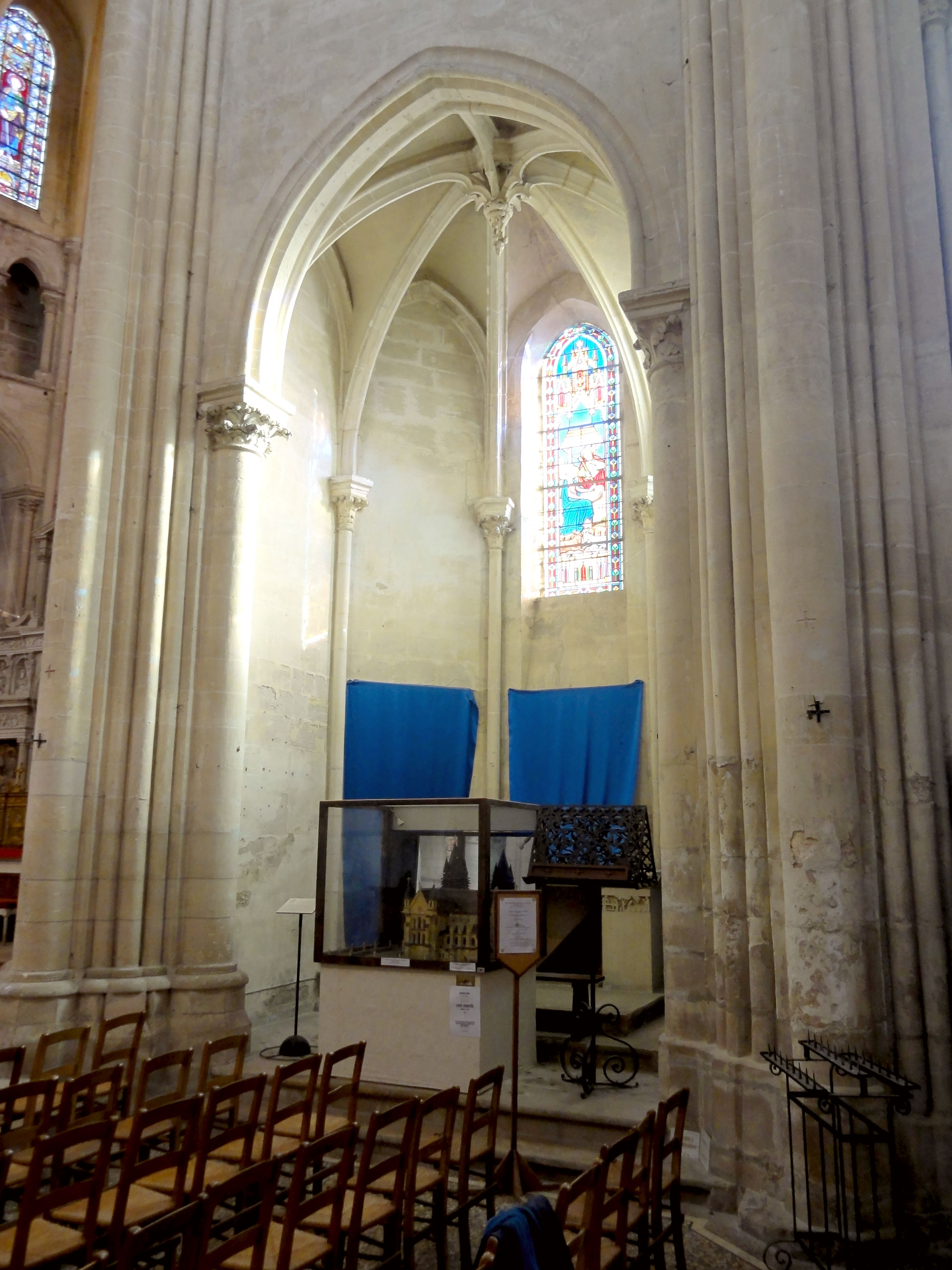 Chapelle St-Barthélémy (absidiole sud).